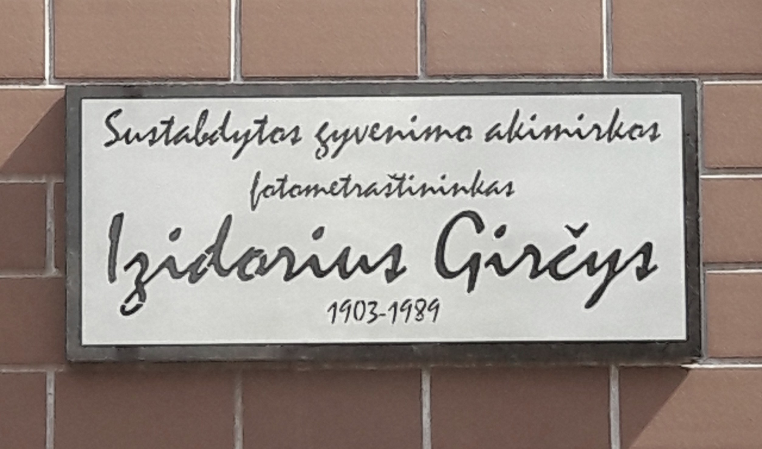 Ant Anykščių bibliotekos atminimo lentelė